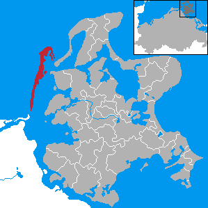 Insel Hiddensee, Landkreis Rügen, Mecklenburg-Vorpommern